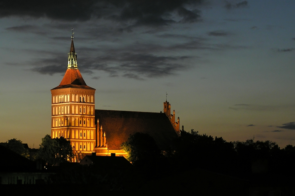 Olsztyn katedra nocą